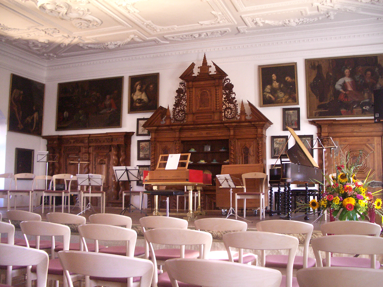 Wolfegg, Germany: Schloss Wolfegg, Bankettsaal (mit Bühne für ein Konzert der Internationalen Festspiele 2005)